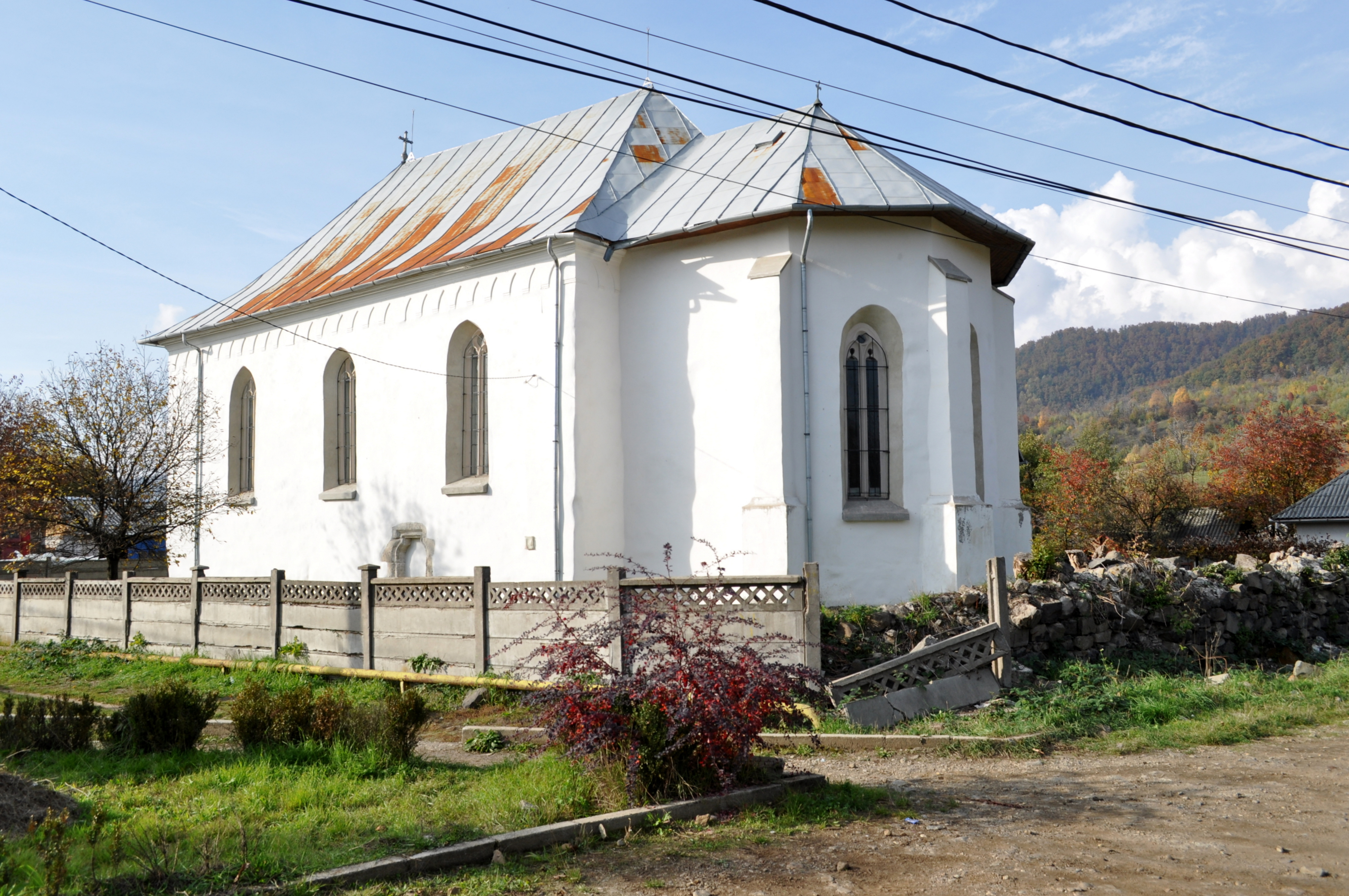 Biserica romano catolică "Tăierea Capului Sf. Ioan", sat aparținător Tăuții de Sus; oraș Baia Sprie